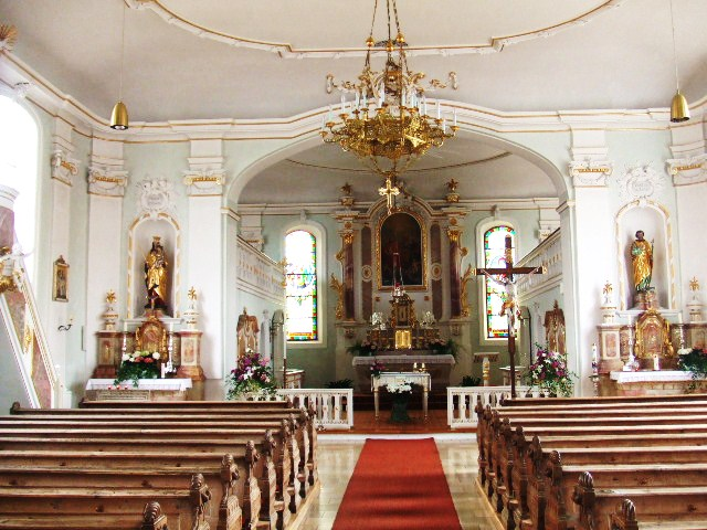 Kath. Filialkirche zur Heiligsten Dreifaltigkeit, Kronburg, Landkreis Unterallgäu